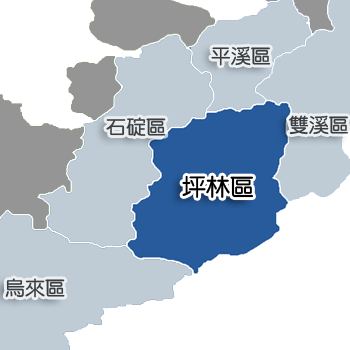 中文（台灣）: 坪林區相對位置。